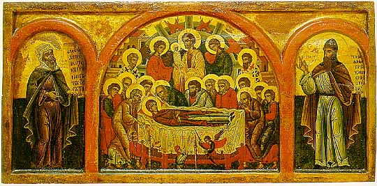 УСПЕНИЕ НА БОГОРОДИЦА СО СВ. КОЗМА МАЈУМСКИ И СВ. ЈОВАН ДАМАСКИН. Икона од Димитар Зограф од с. Леуново - Мавровско. 1537-1543 год. 36,5 x 73 cm. Темпера. Гипсен грунд на штица. Од црквата Св. Никола на Топличкиот манастир, с. Жван - Демирхисарско. Денес во музејот на град Битола.